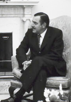 Pik Botha